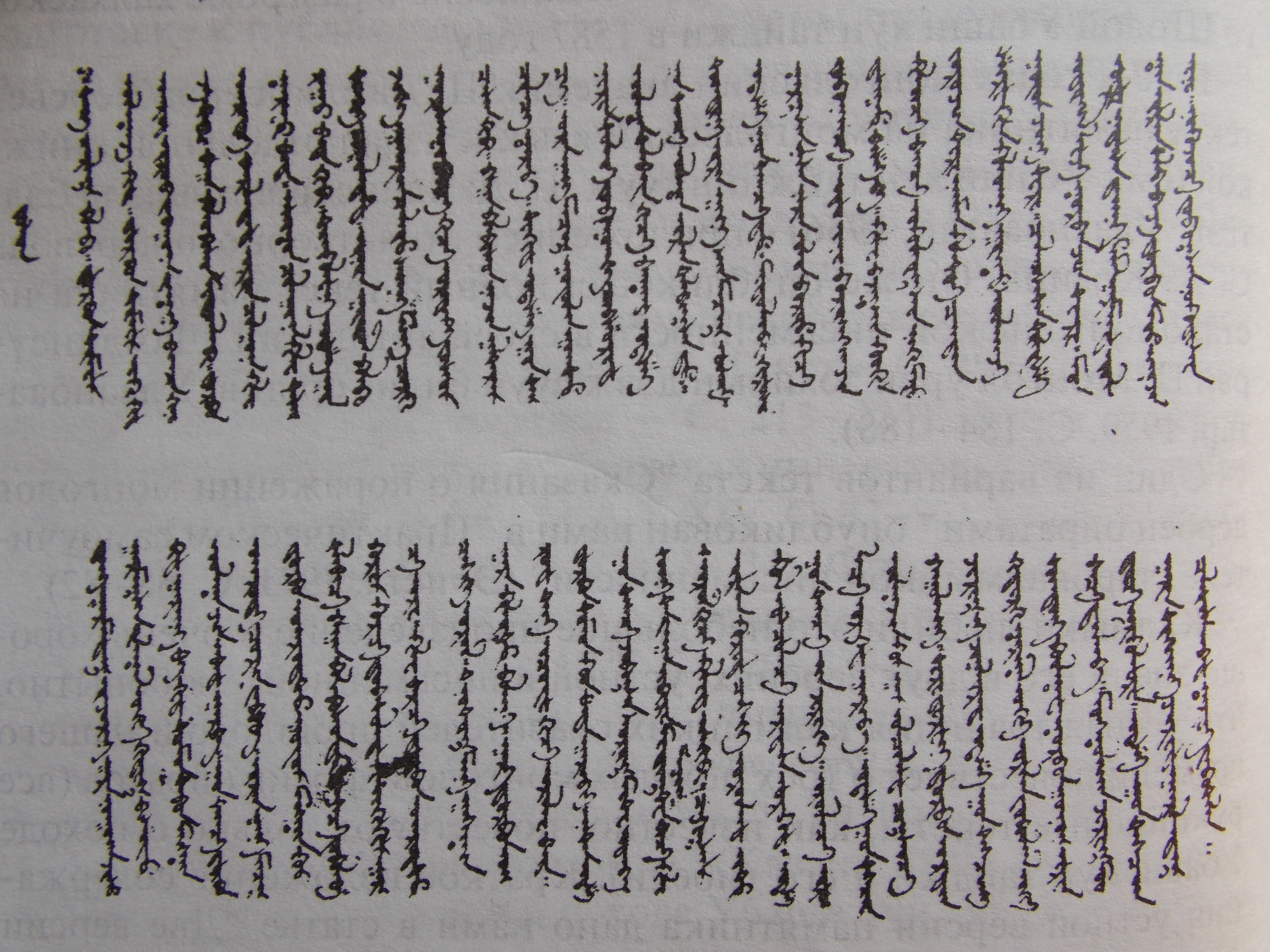 "Сказание о победе дербен-ойратов над монголами", Лист 7, Библиотека Восточного факультета СПбГУ